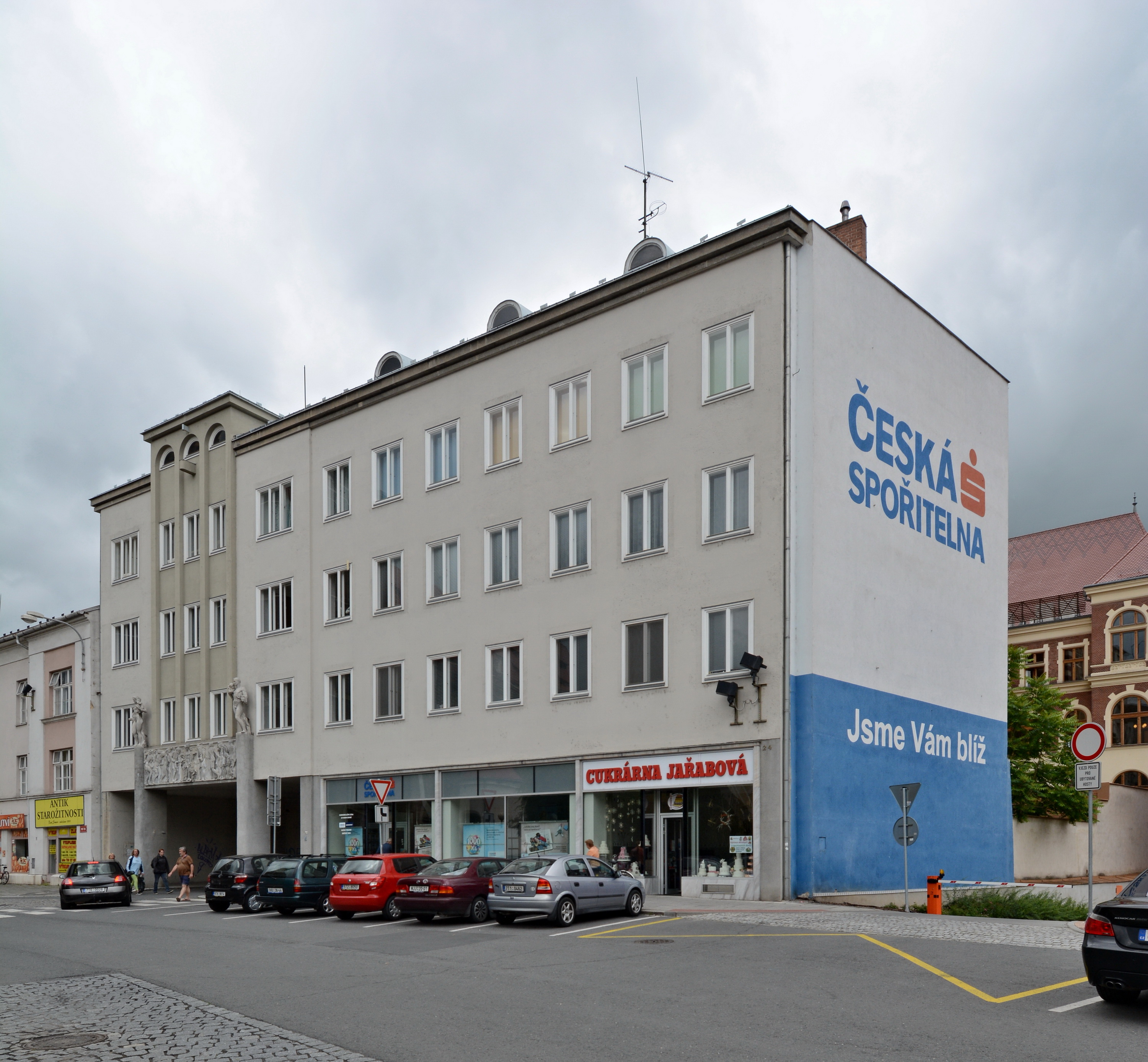 Opava Horní náměstí 170/24, Čapkova 2, Otto Reichner: dům městské spořitelny, postaveno 1937-1939.